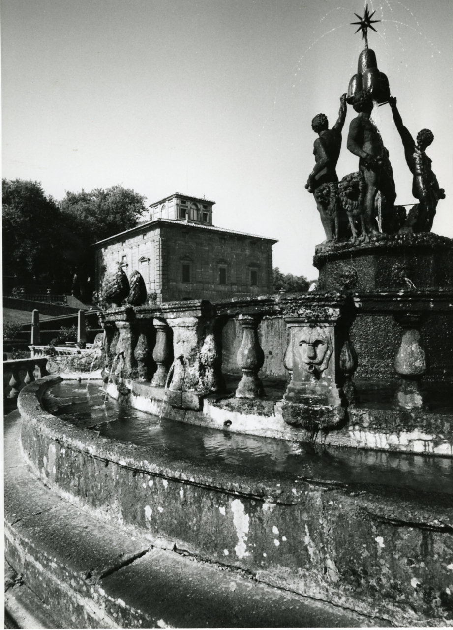 Bagnaia. Villa Lante della Rovere. Serie fotografica : Viterbo, 1965 / Paolo Monti. - Stampe: 5 : Positivo b/n, gelatina bromuro d'argento/ carta, 24x30. - ((Al verso delle stampe manoscritto numero di negativo corrispondente: 290/23, 299, 299/48-49, 299/70. Al verso di alcune stampe manoscritto: "Caprarola/Palazzo Farnese", "Caprarola Rampa ellittica di Palazzo Farnese", "Caprarola". Sul coperchio della scatola manoscritto a pennarello nero: "Città storiche/ Lazio". - Occasione: Documentazione per la pubblicazione: "Emilio CECCHI, Natalino SAPEGNO (a cura di), Storia della Letteratura Italiana, 9 voll., Milano, Garzanti, 1966 e segg.". - Fonte: Monografia di Cecchi Emilio, Sapegno Natalino (a cura di): Storia della Letteratura Italiana, 9 voll., Milano, Garzanti (1966 e segg.)